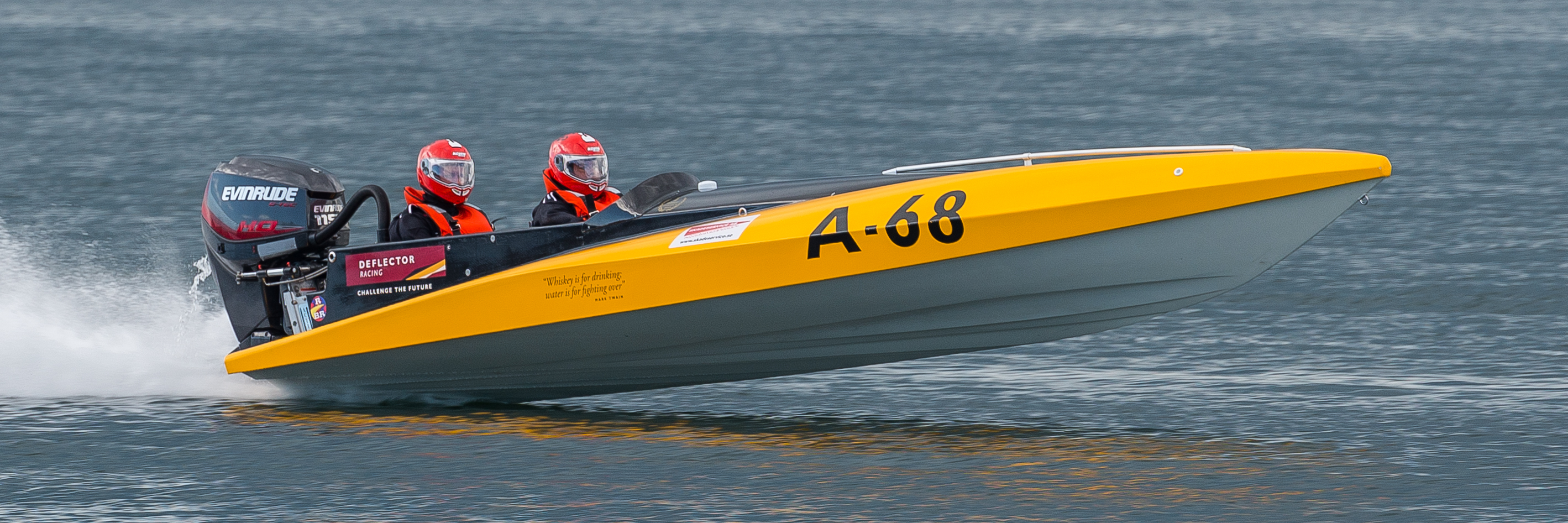 Roslagsloppet Arholma August 2016